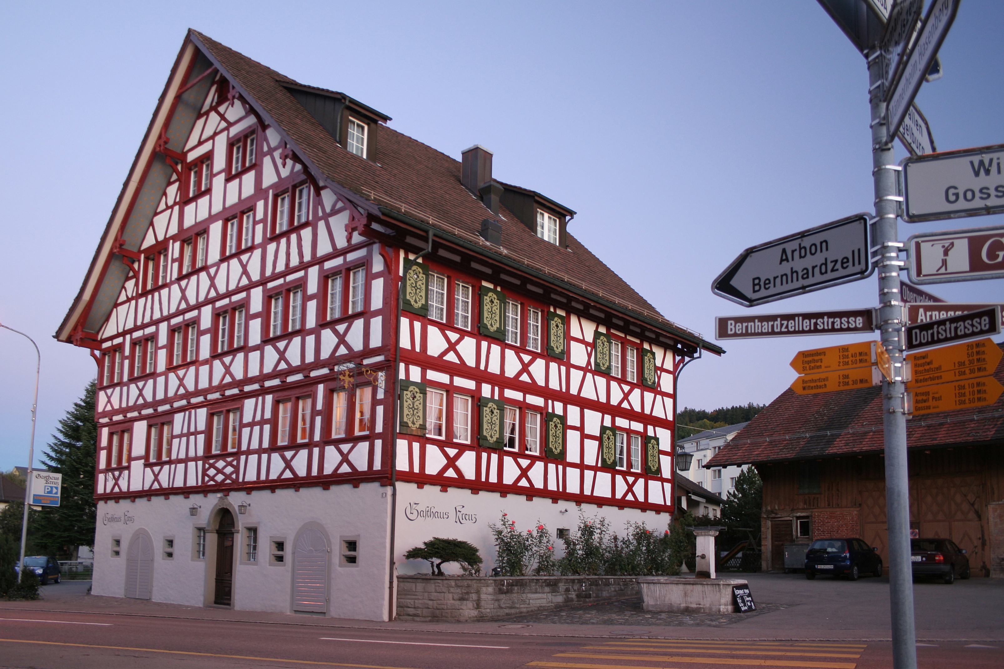 Der Gasthof (Hotel-Restaurant) Kreuz an der Dorfkreuzung von Waldkirch (SG), Schweiz